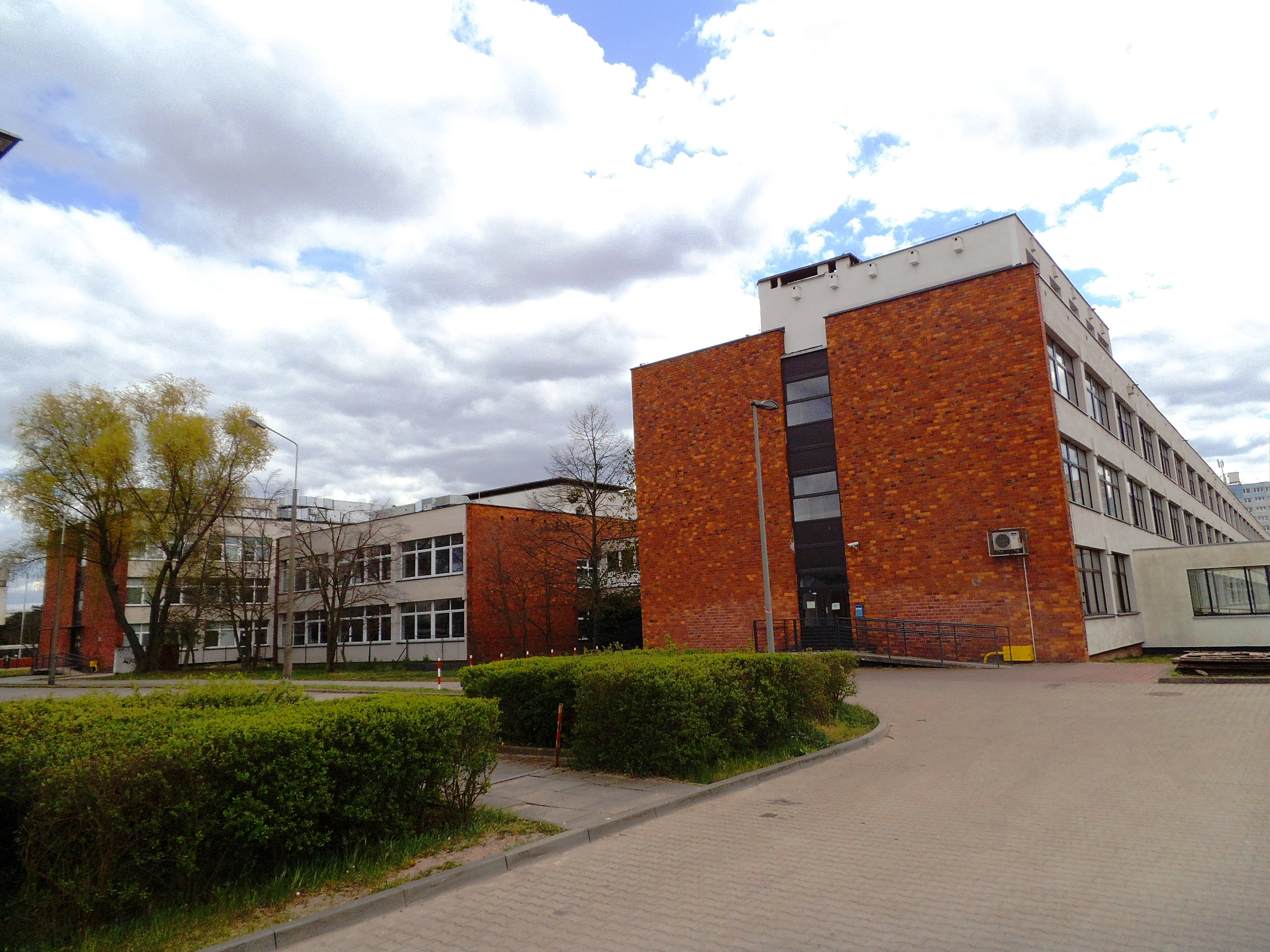 Budynek Wydziału Chemii UMK w Toruniu1, 2020